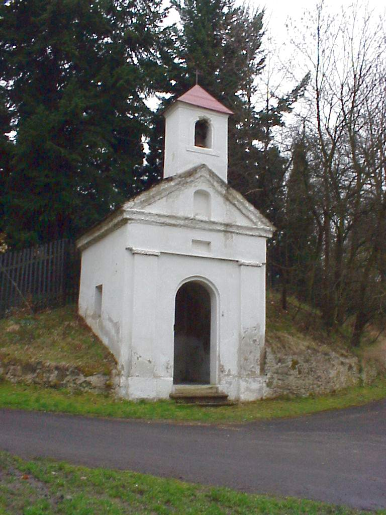 chapel in Budov